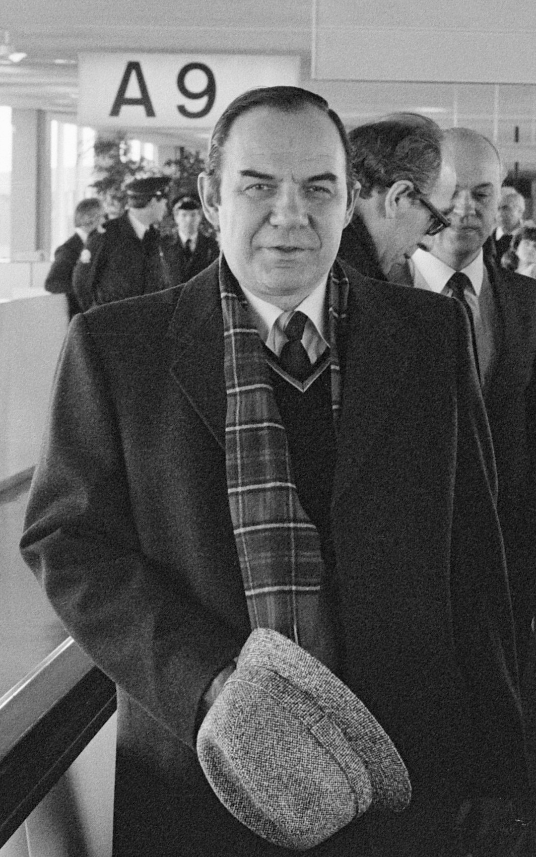 Zoon Russische minister van BuiZa Gromyko bezoekt land